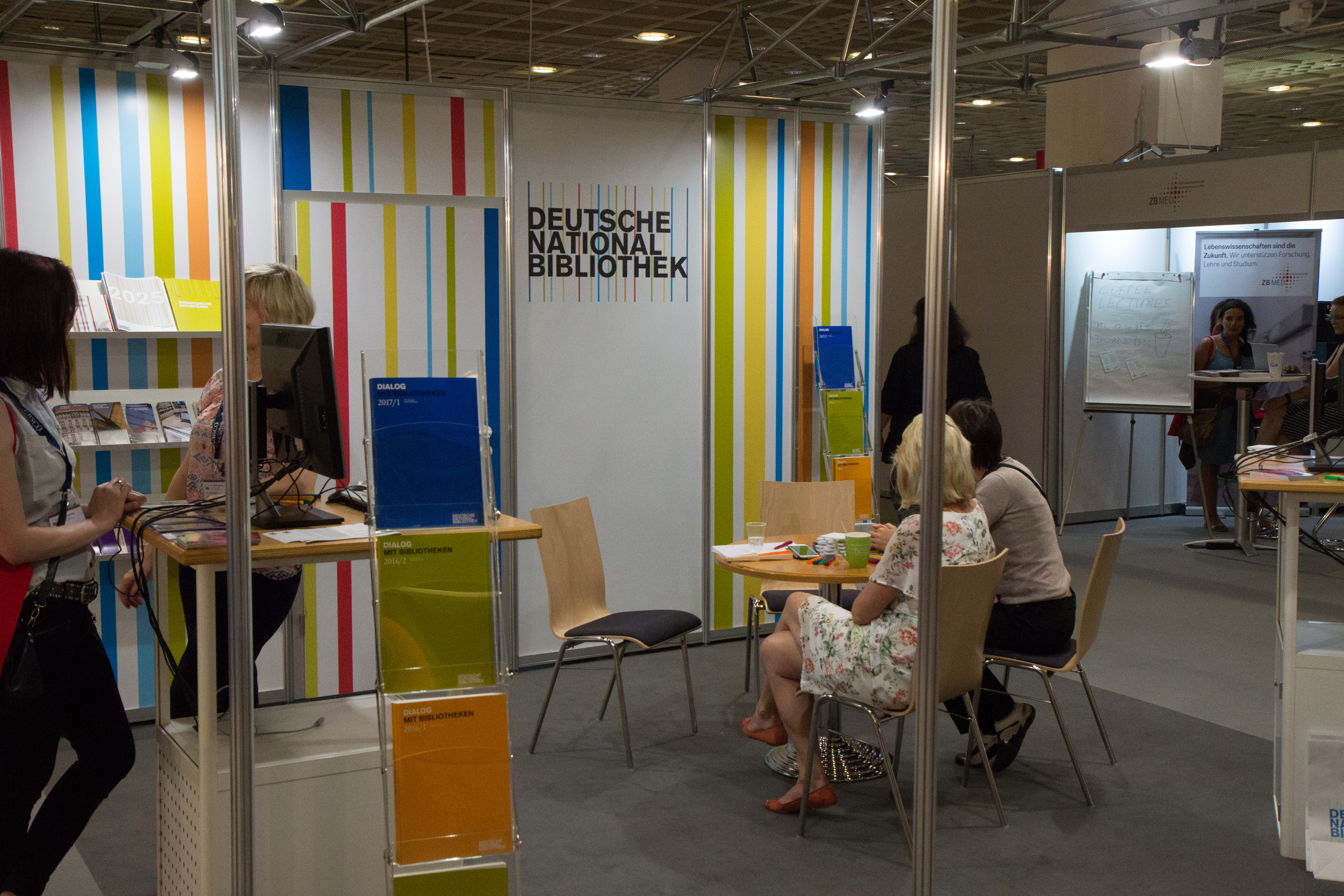 106. Deutscher Bibliothekartag in Frankfurt/Main